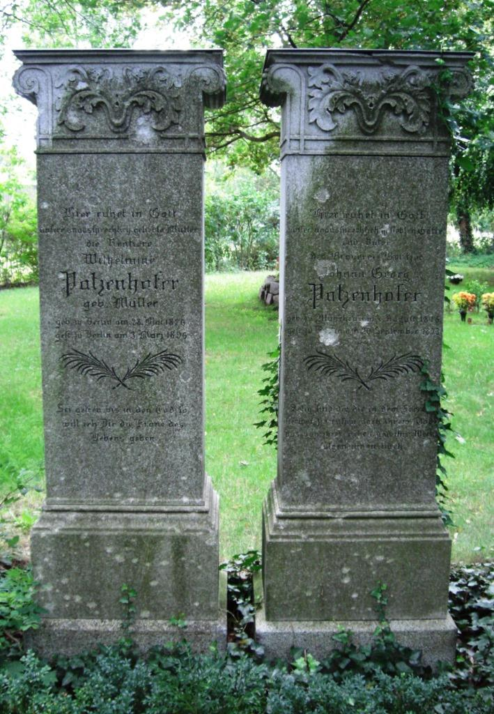 Grab des Bierbrauers Johann Georg Patzenhofer (1815-1873) und seiner Frau Wilhelmine auf dem St.-Hedwig-Friedhof I in Berlin-Mitte